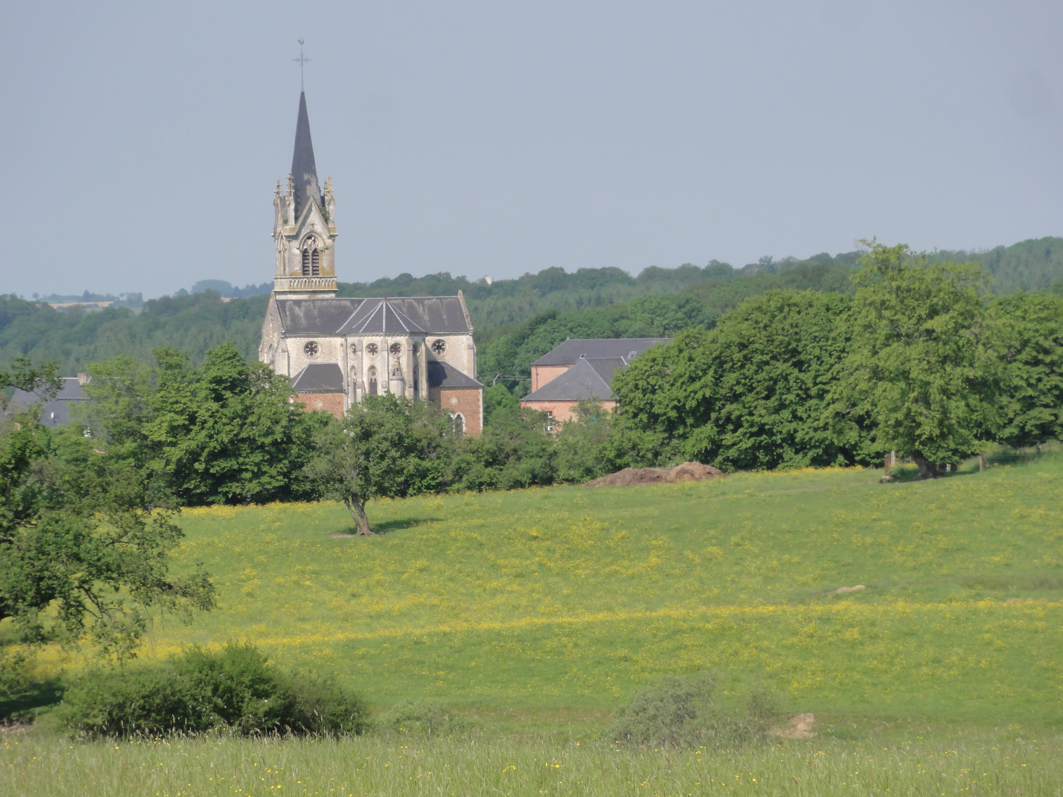 Le Fréty (Ardennes) vue sur l'église